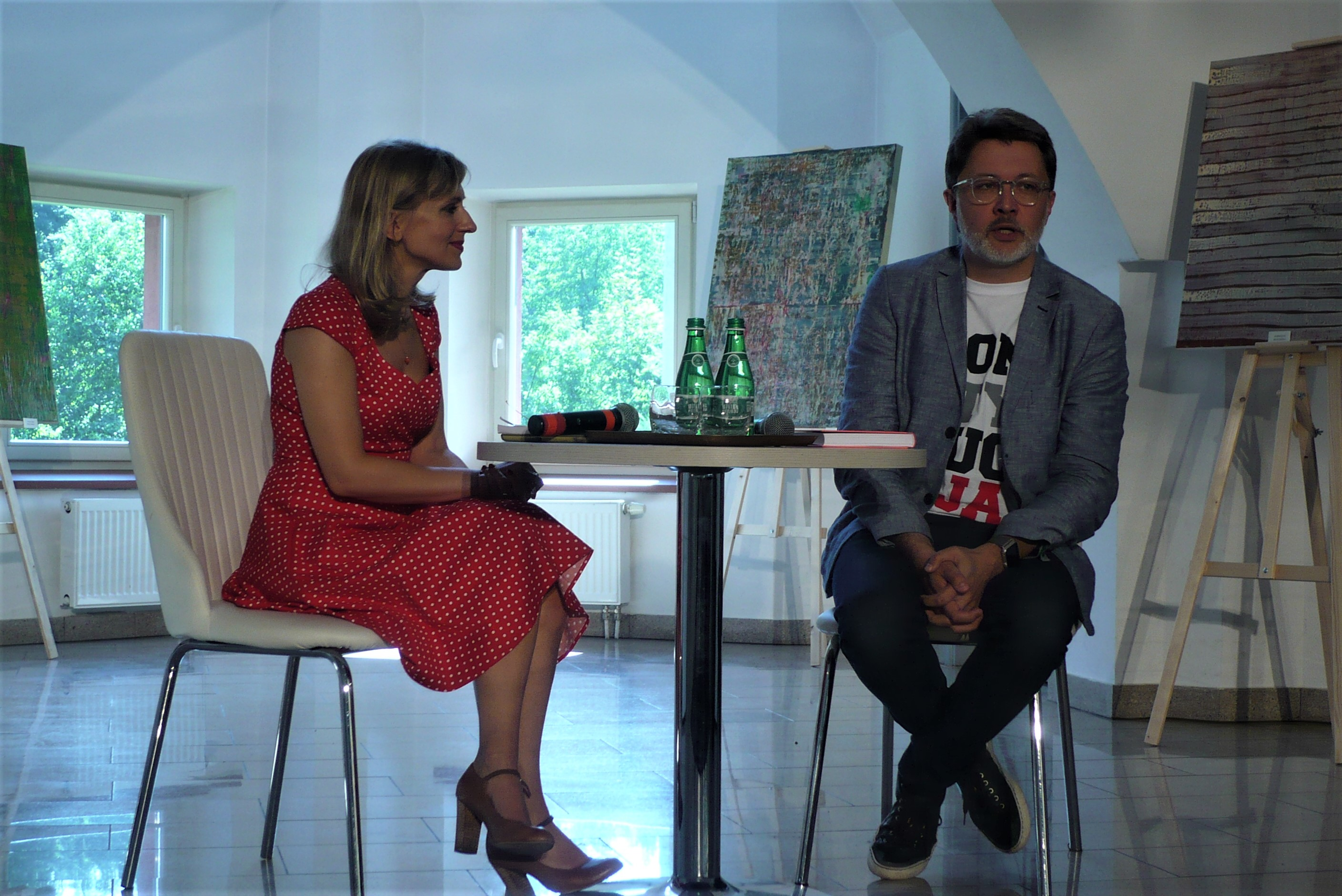 Justyna Sobolewska i Michał Rusinek, Festiwal Góry Literatury, 2018